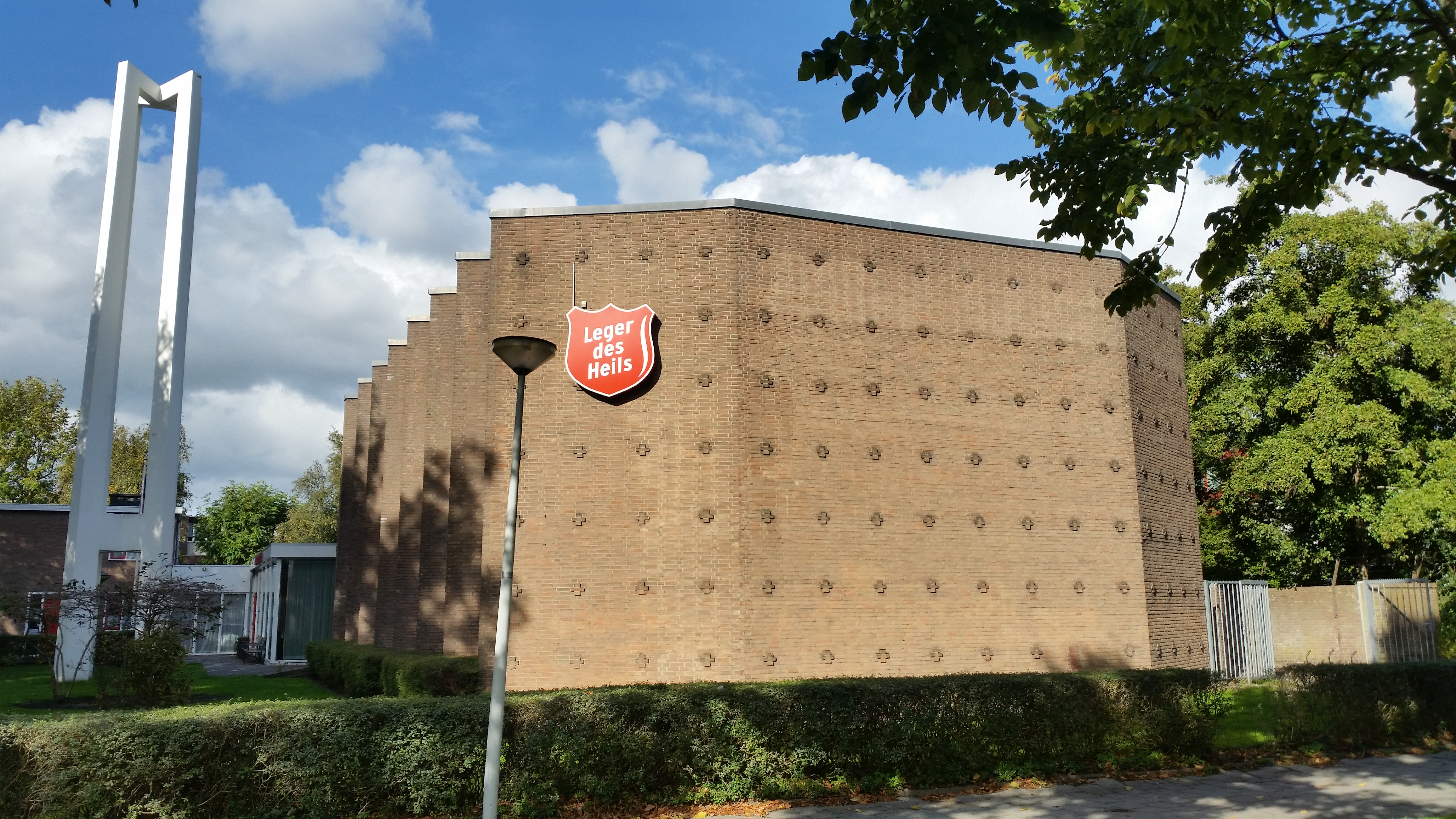 zijaanzicht van De Kandelaar met los staande toren